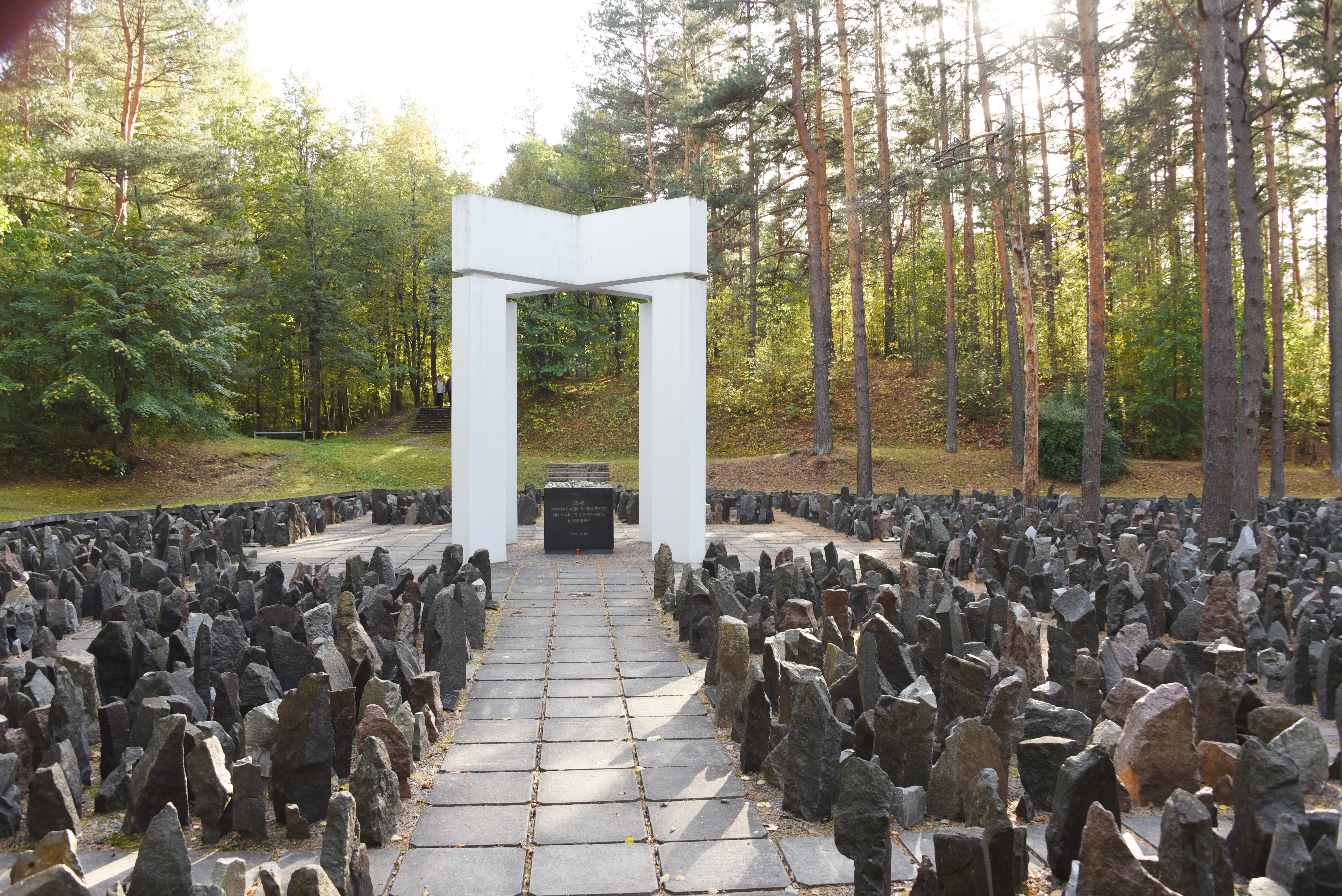 Gedenkstätte Bikernieki